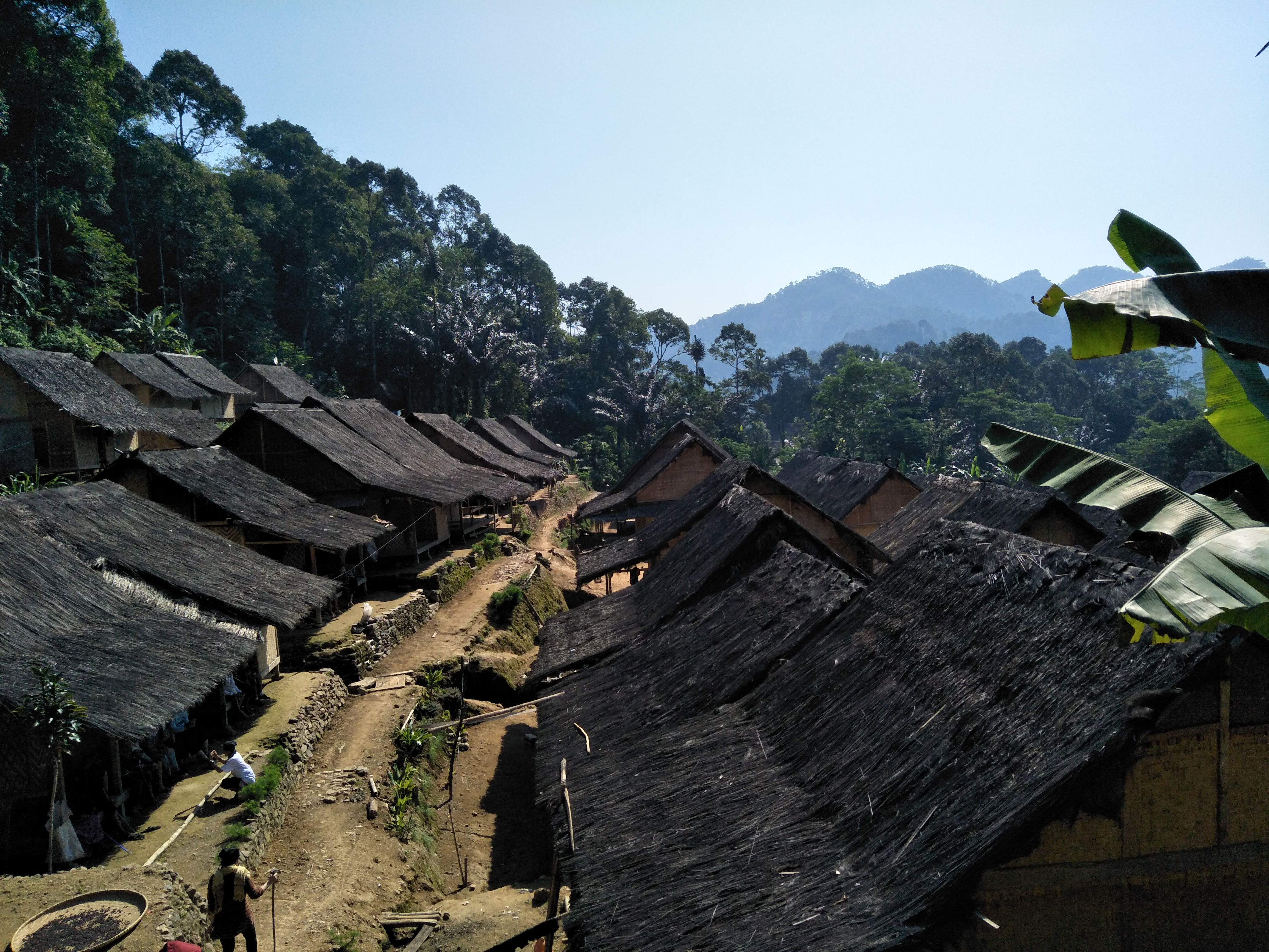 Barisan Pemukiman Suku Baduy Luar, atap rumah tersebut terbuat dari ijuk yang diambil pohon Aren.